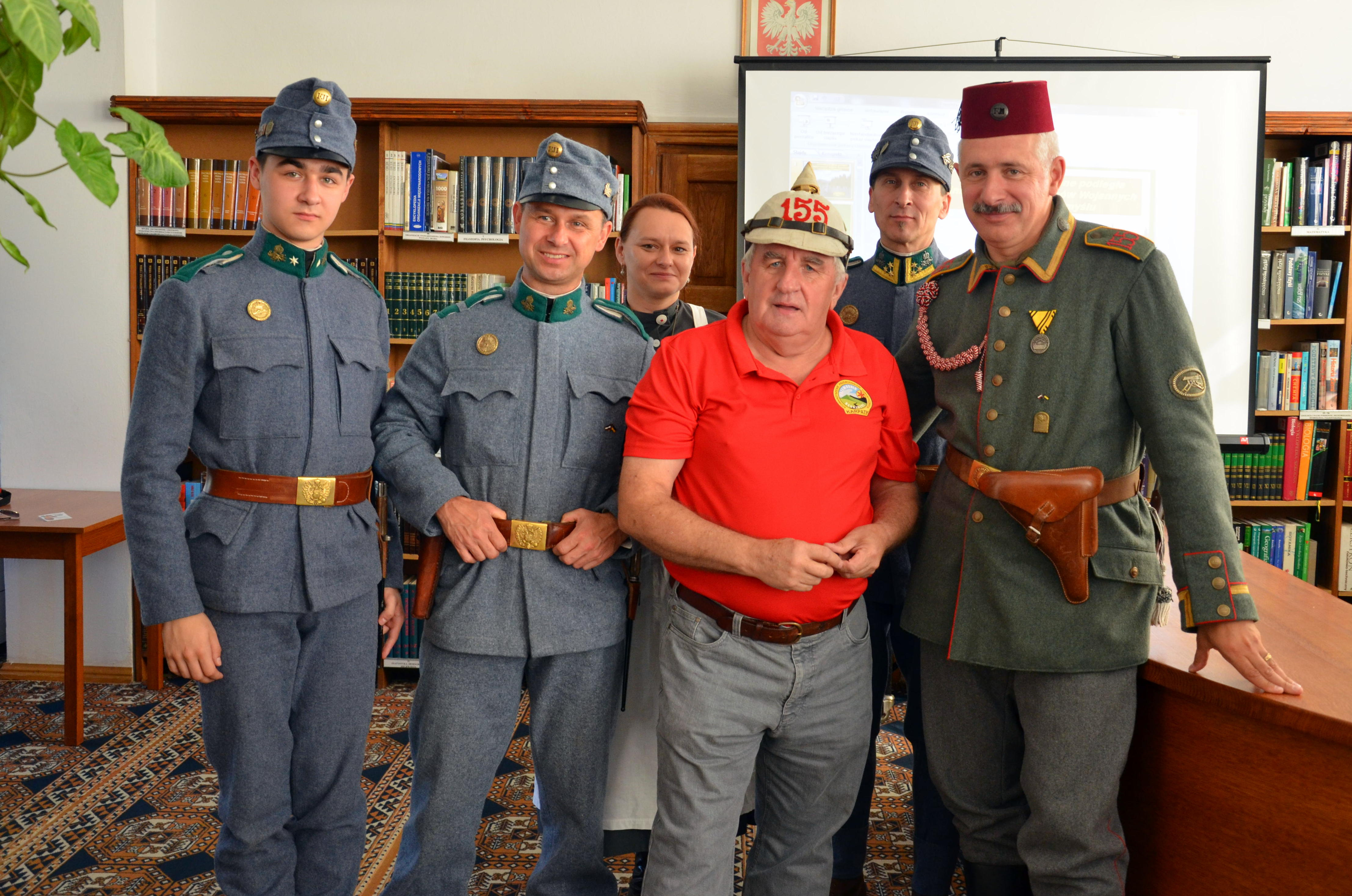 Die Verein debattiert, in Sanok zum Thema "Soldatenfriedhöfe und Kriegsgräberstätten in Mittel Galizien" zu sprechen.